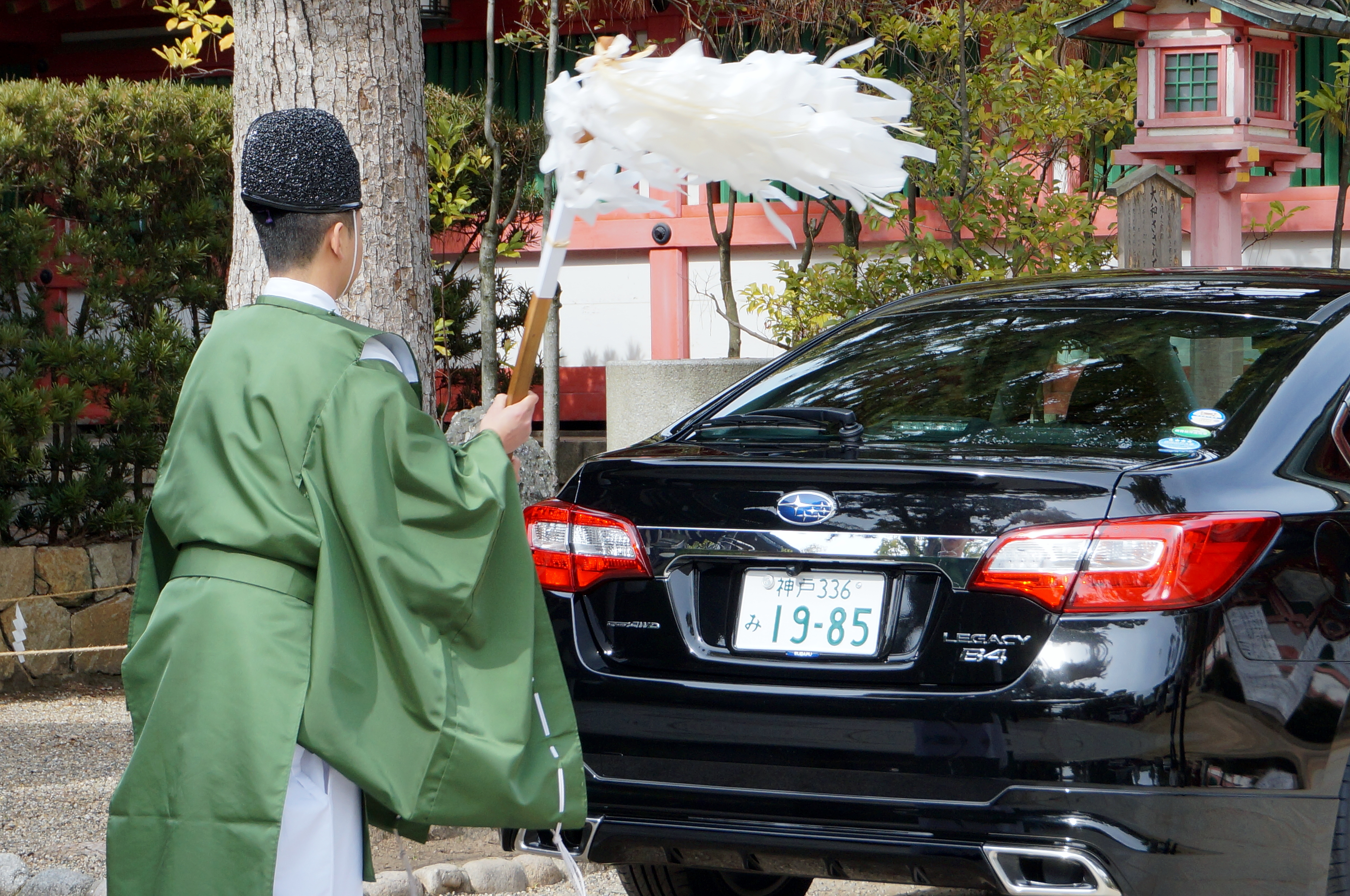 Prêtre purifiant une voiture